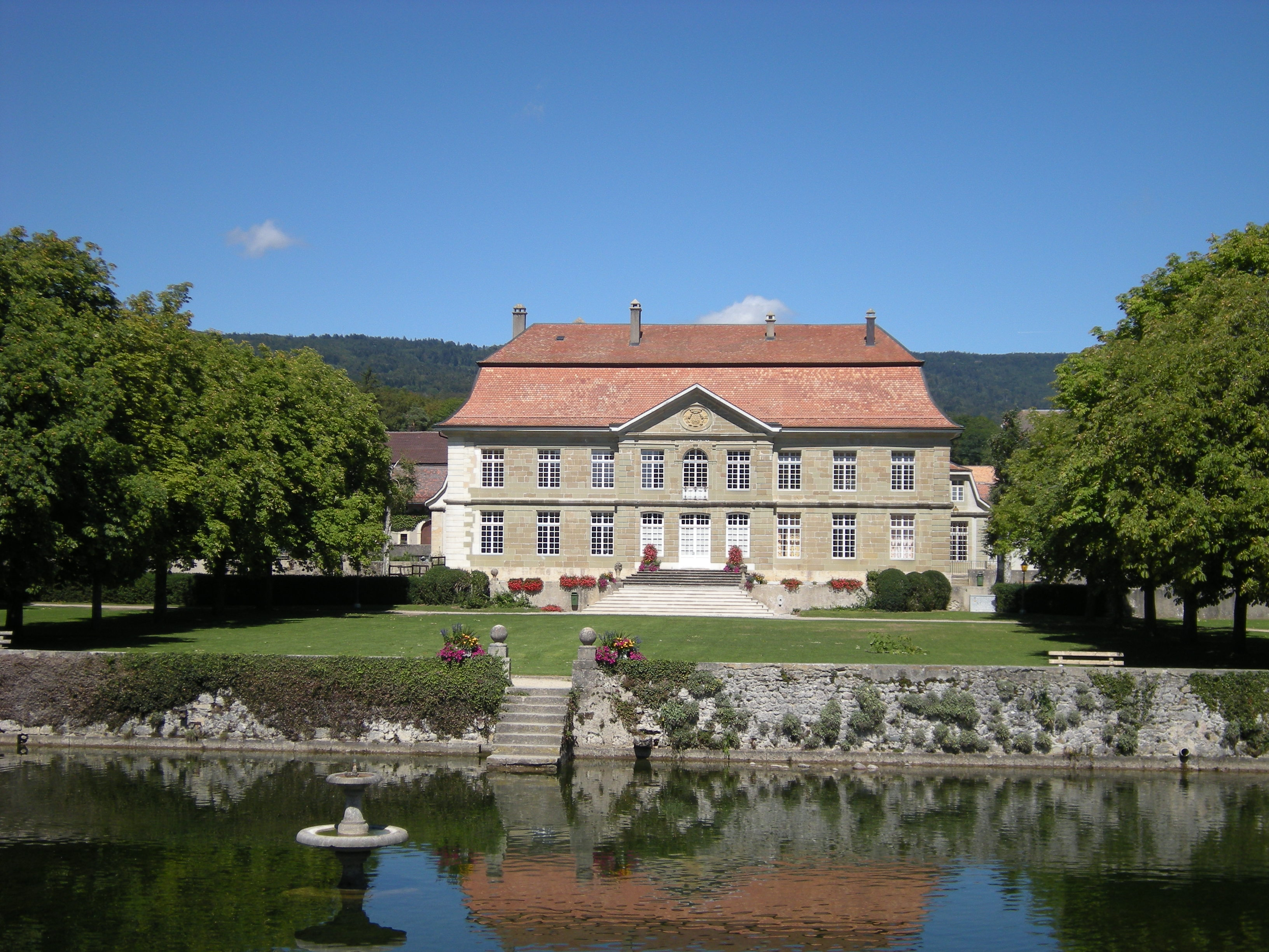 Château d'Isle